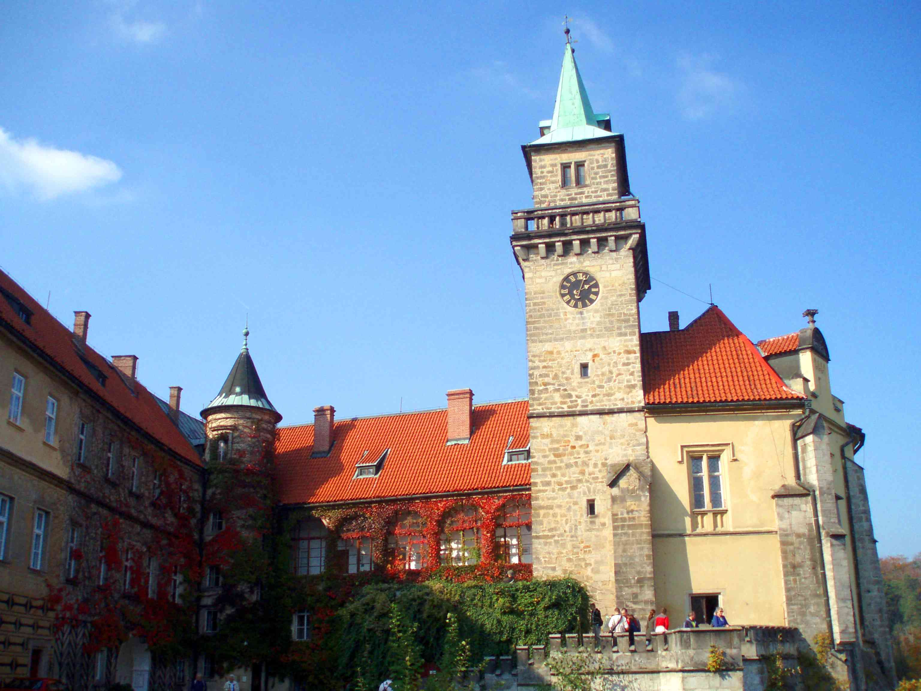 Schloss Hruba Skala